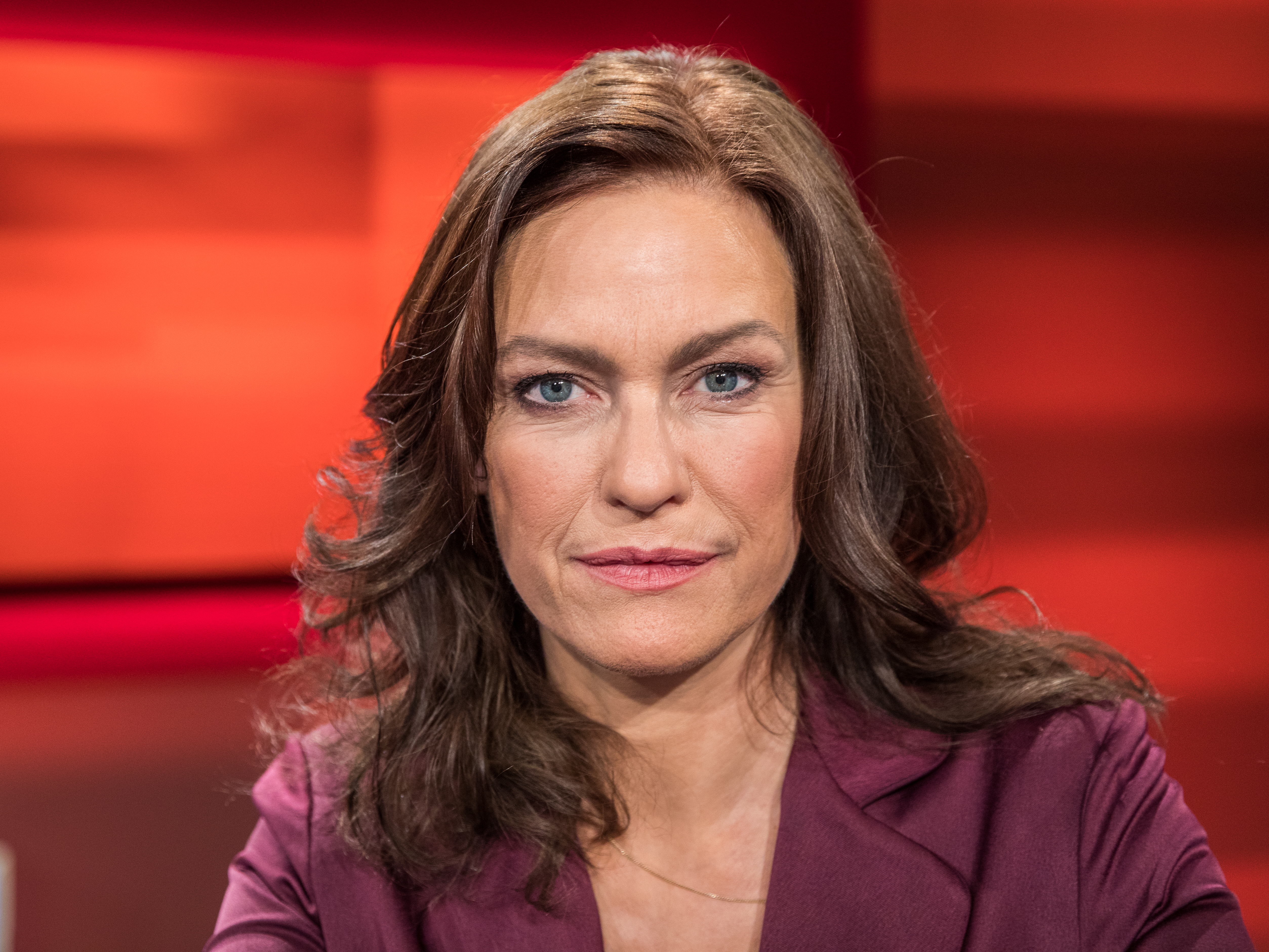 Pressetermin nach der Sendung „Hart aber Fair“ am 2. Dezember 2019. Thema der Sendung: „Weckruf oder Panikmache: Braucht das Klima eine Öko-Revolution?“ Foto: Nina Kronjäger, Schauspielerin